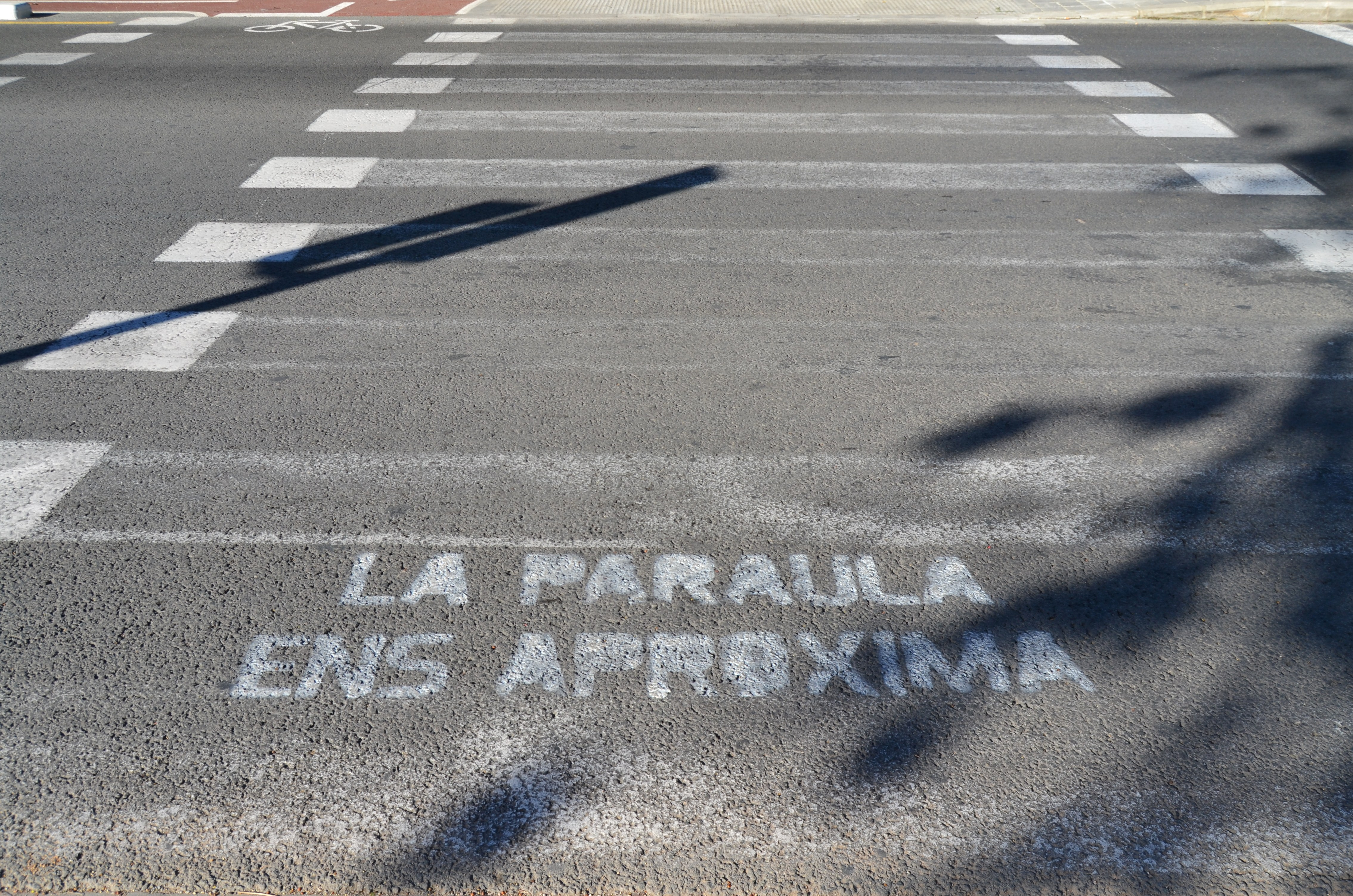 La paraula ens aproxima, pas de zebra al carrer de Cavanilles de València.